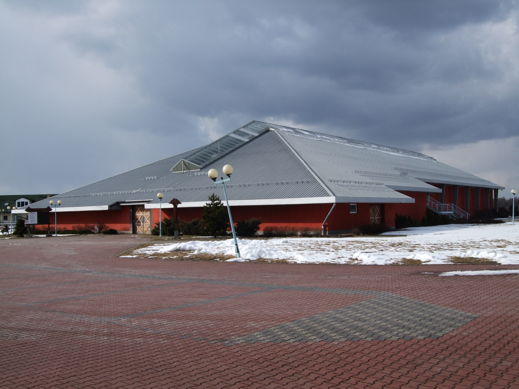 Hippiczny Ośrodek Rehabilitacyjno Rekreacyjny "Trójka", 43-604 Jaworzno Ciężkowice ul.Filomatów 37